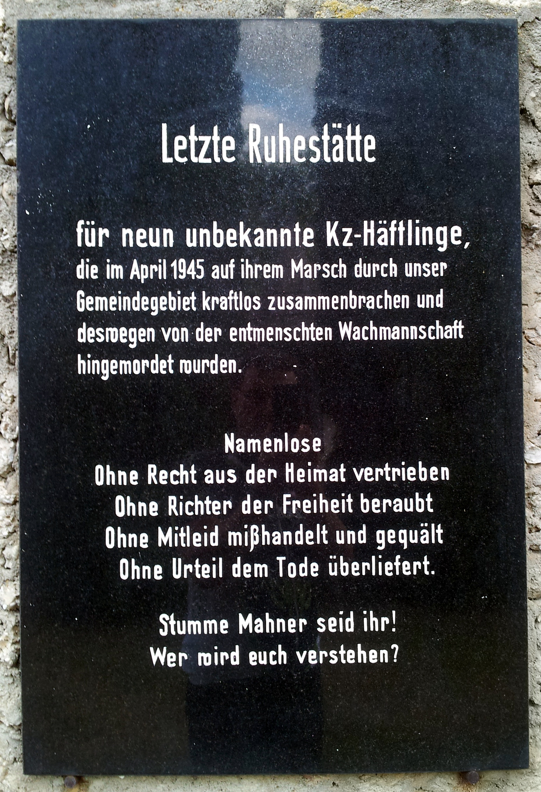 Mahntafel zum Marsch von 6000 Juden nach Mauthausen